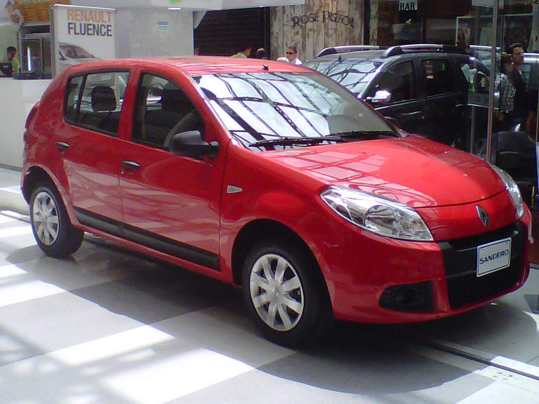 Parte delantera del Renault Sandero en Colombia.